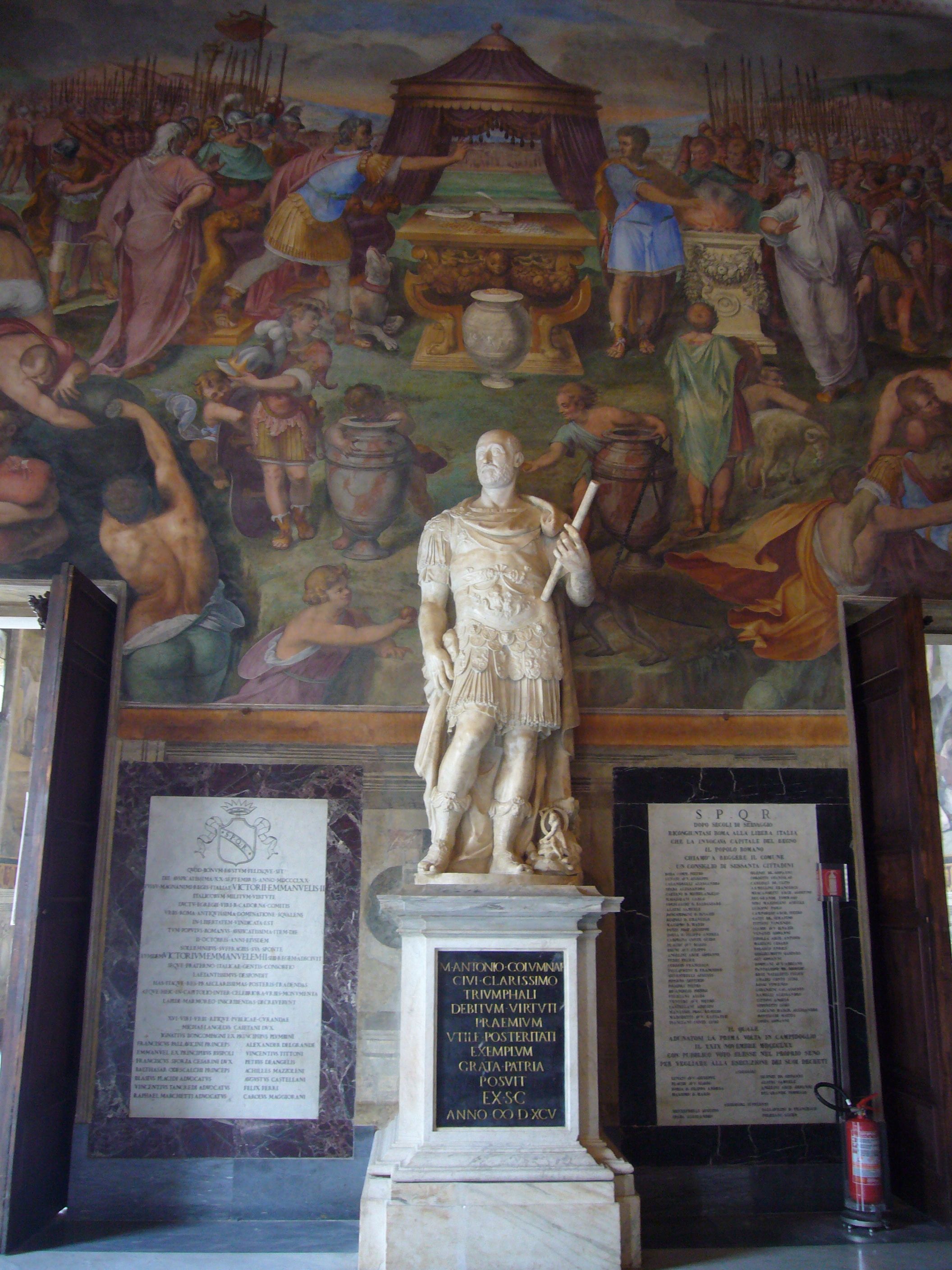 Roma, Palazzo dei Conservatori al Campidoglio: Marcantonio Colonna (1595), ritratto aggiunto su scultura romana